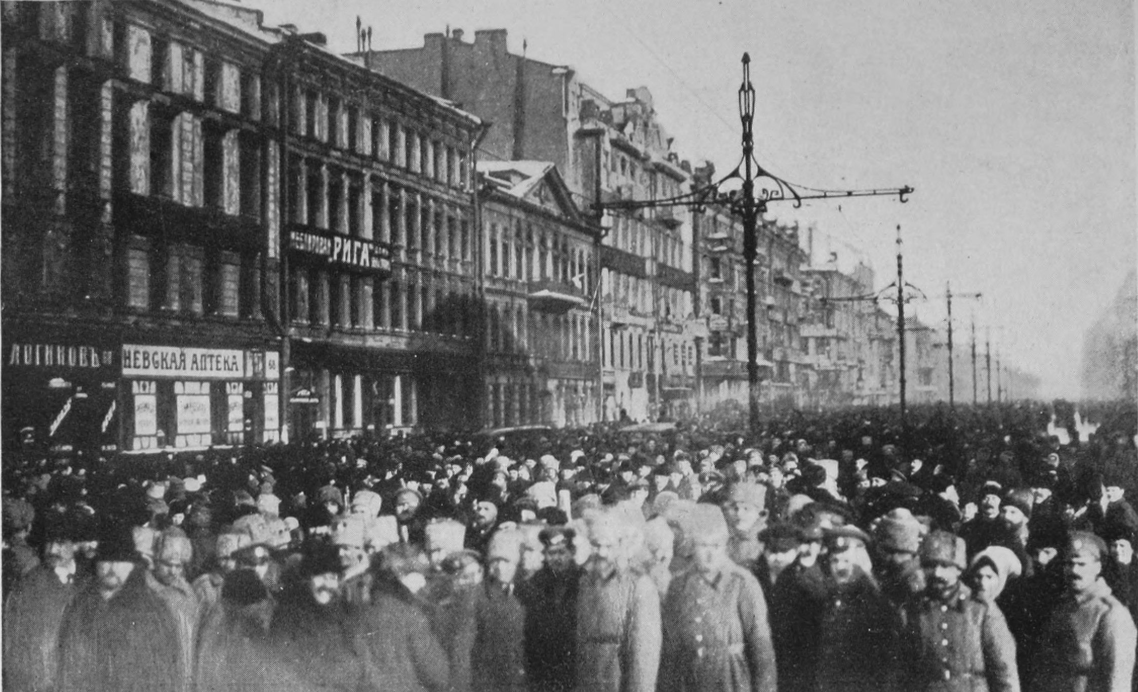 Manifestación en el Nevsky Prospekt, Petrogrado, marzo de 1917.